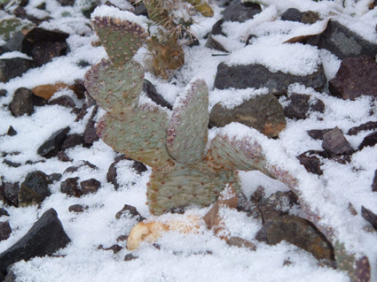 Opuntia basilaris